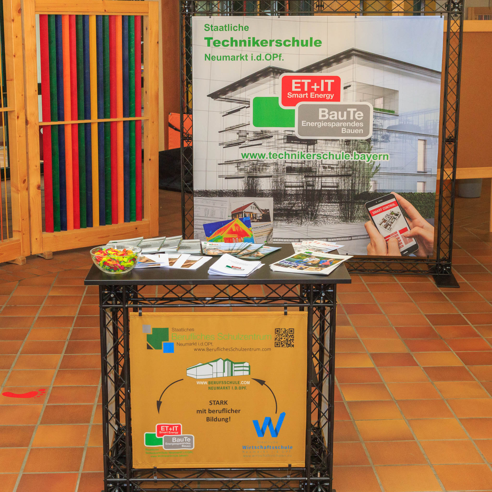 Fleyerstand Tag der offenen Tür 2018